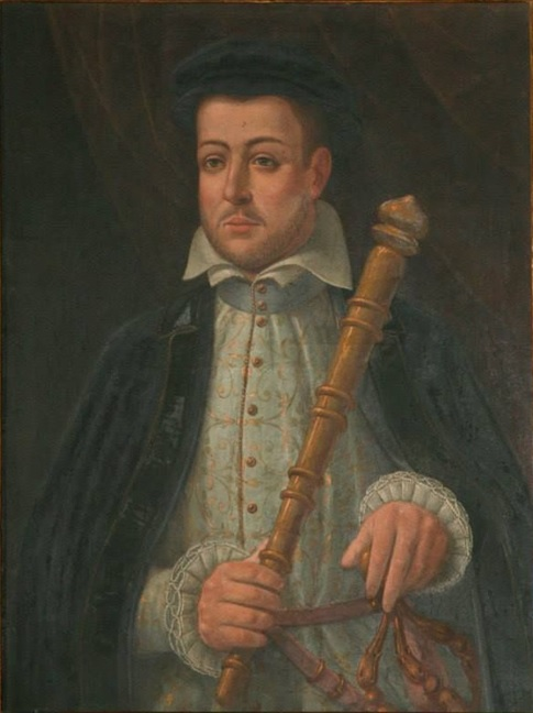 Anonimo, Ritratto di Paolo Giordano Orsini, 1560, olio su tela, Castello Odescalchi, Bracciano